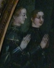 Klášter Neuberg - synové Oty Habsburského